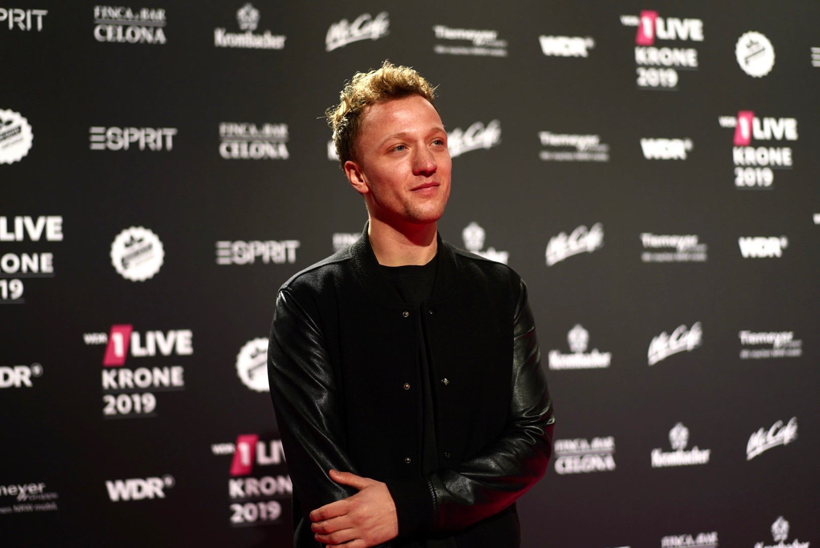 Joris bei der 1LIVE Krone 2019